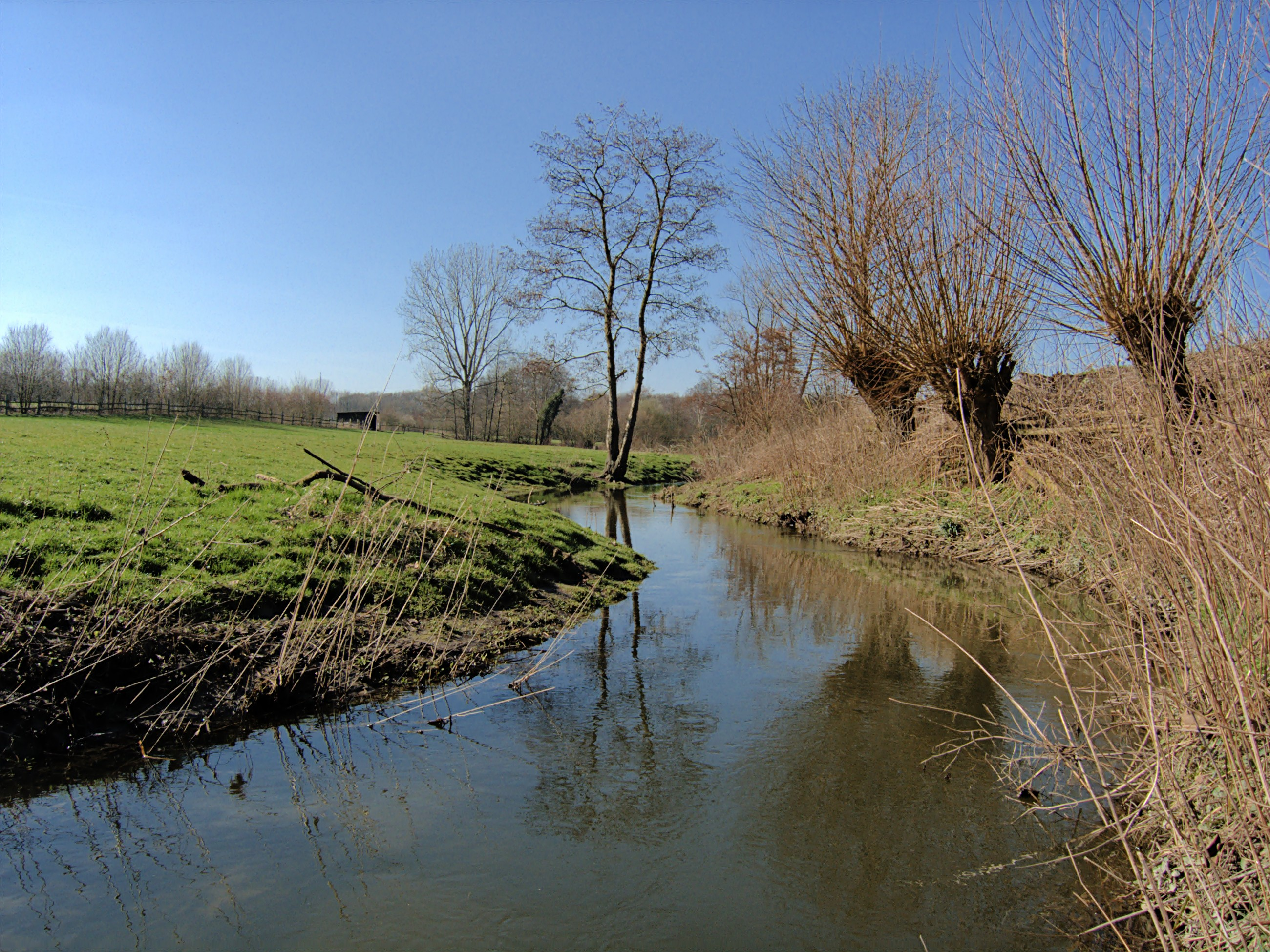 Kreuzbach (Kasewinkel). Location: Münster, NRW, Germany